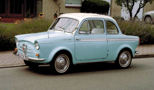 Kleinfahrzeuge mit auffallend eleganter Note sieht man nicht alle Tage. Darum ist der ‚Weinsberg 500’ genau das richtige Automobil für kluge Individualisten, die auch von einem Kleinwagen erwarten, dass er sich in jeder Beziehung aus der Masse heraushebt.